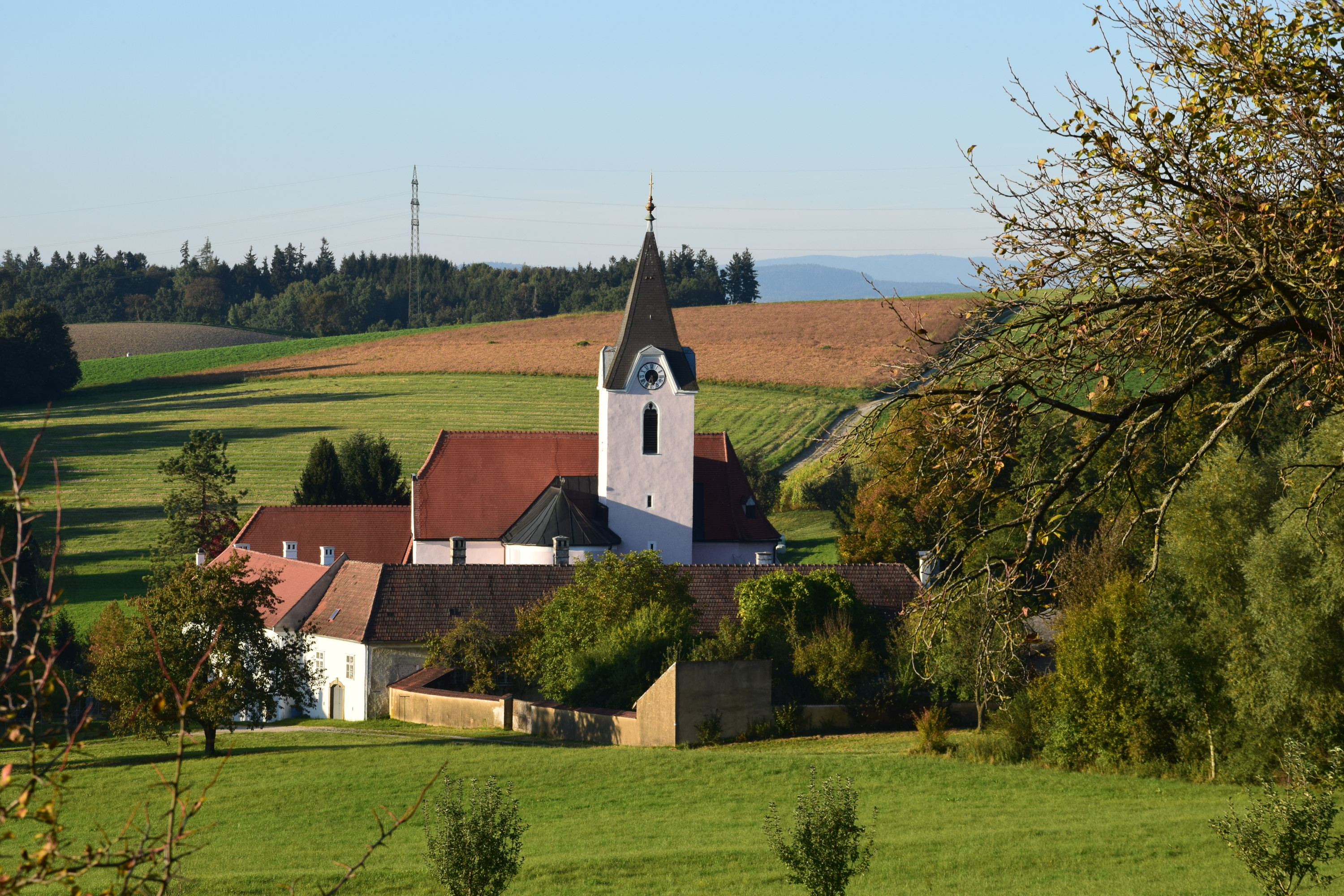 Schloss Kirnberg mit Pfarrhof